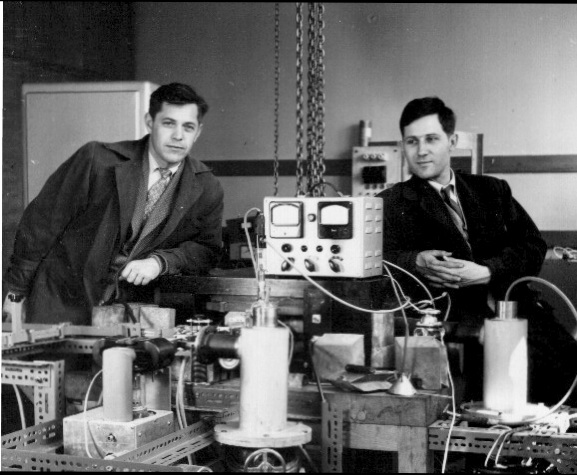 Alojz Paulin (r) mit Franc Požar (l) beim Miktrotron am Institut Jožef Stefan in Ljubljana, 1959